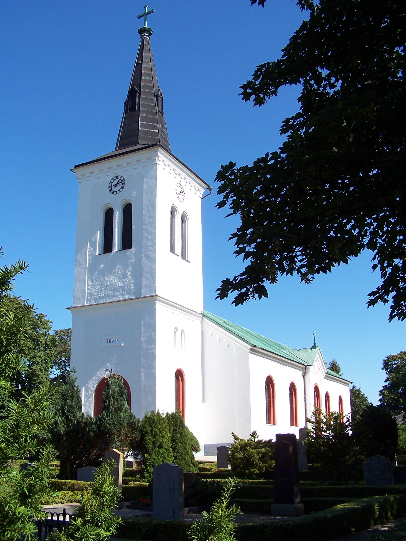 Södervidinge kyrka.